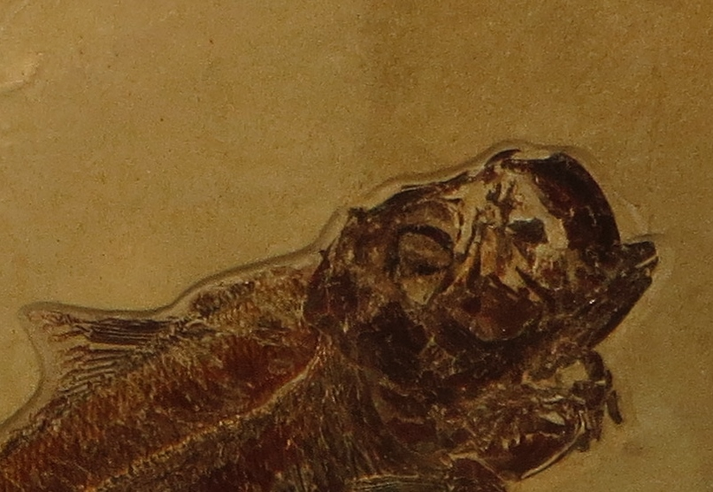 Fossil of Armigatus- Took the picture at Museo Scienze Naturali di Faenza